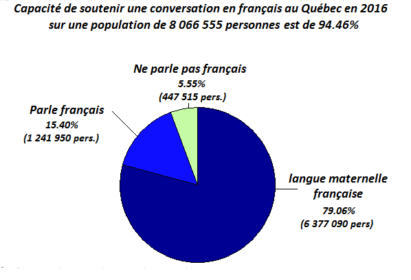 Capacité de soutenir une conversation en français au Québec en 2016